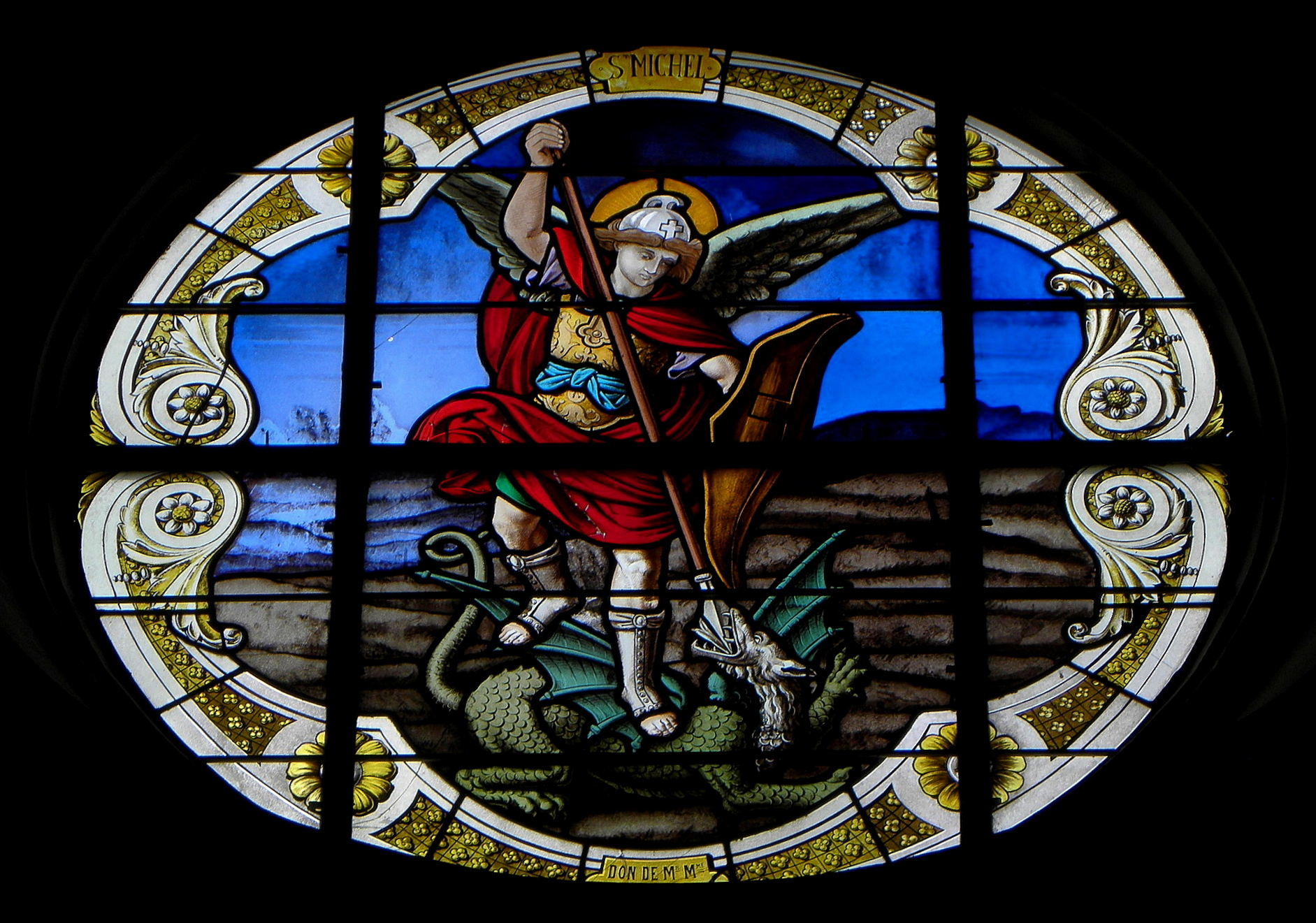 Vitrail de l'église Saint-Martin de Moutiers (35).